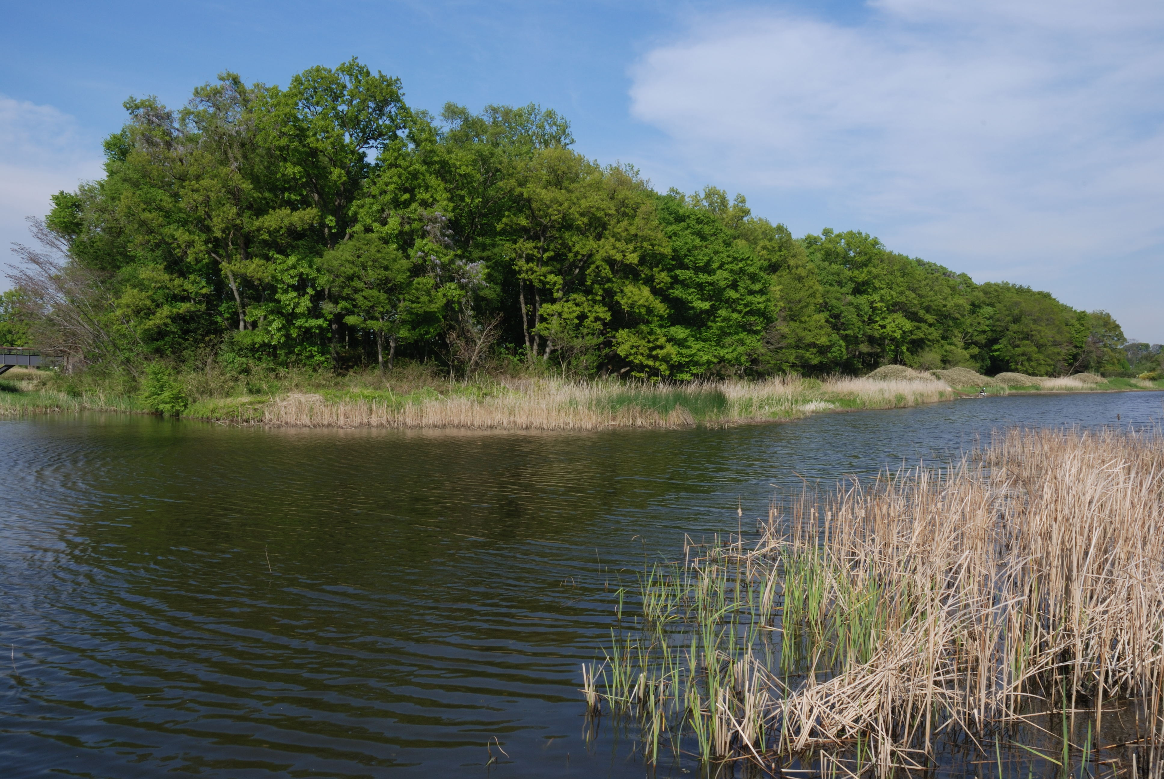 Kogakubo yakata